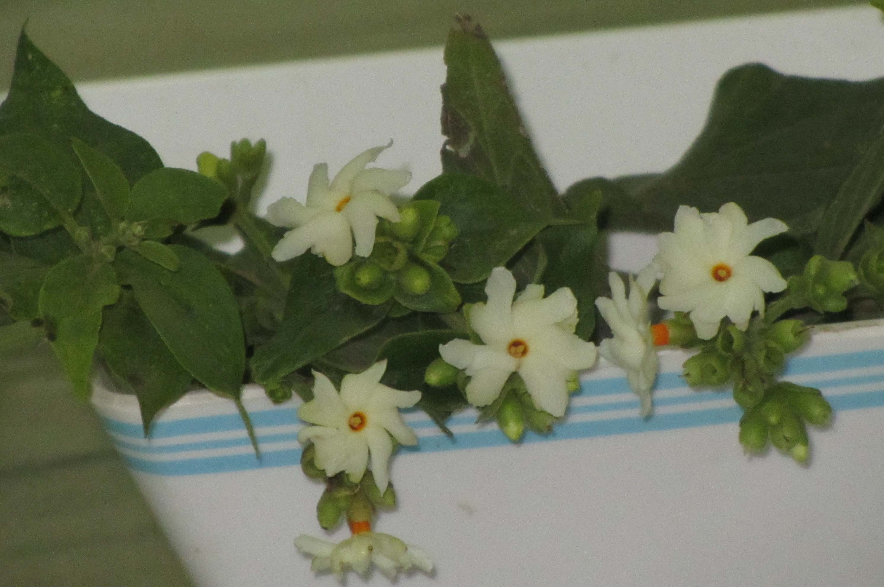 own shot - பவளமல்லிப் பூ. முல்லைப்பூ வகைகளில் ஒன்று. இது மணம் மிக்க பூ. காம்பு மட்டும் பவள நிறம் கொண்டது. இதனை யாரும் சூடிக்கொள்வதில்லை.